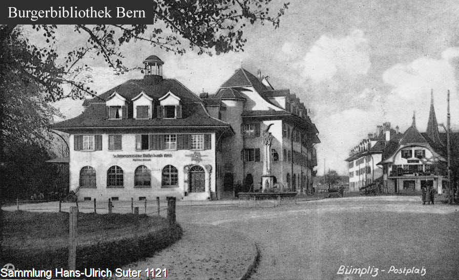 Bern: Bümpliz; Davidbrunnen -- Brunnen